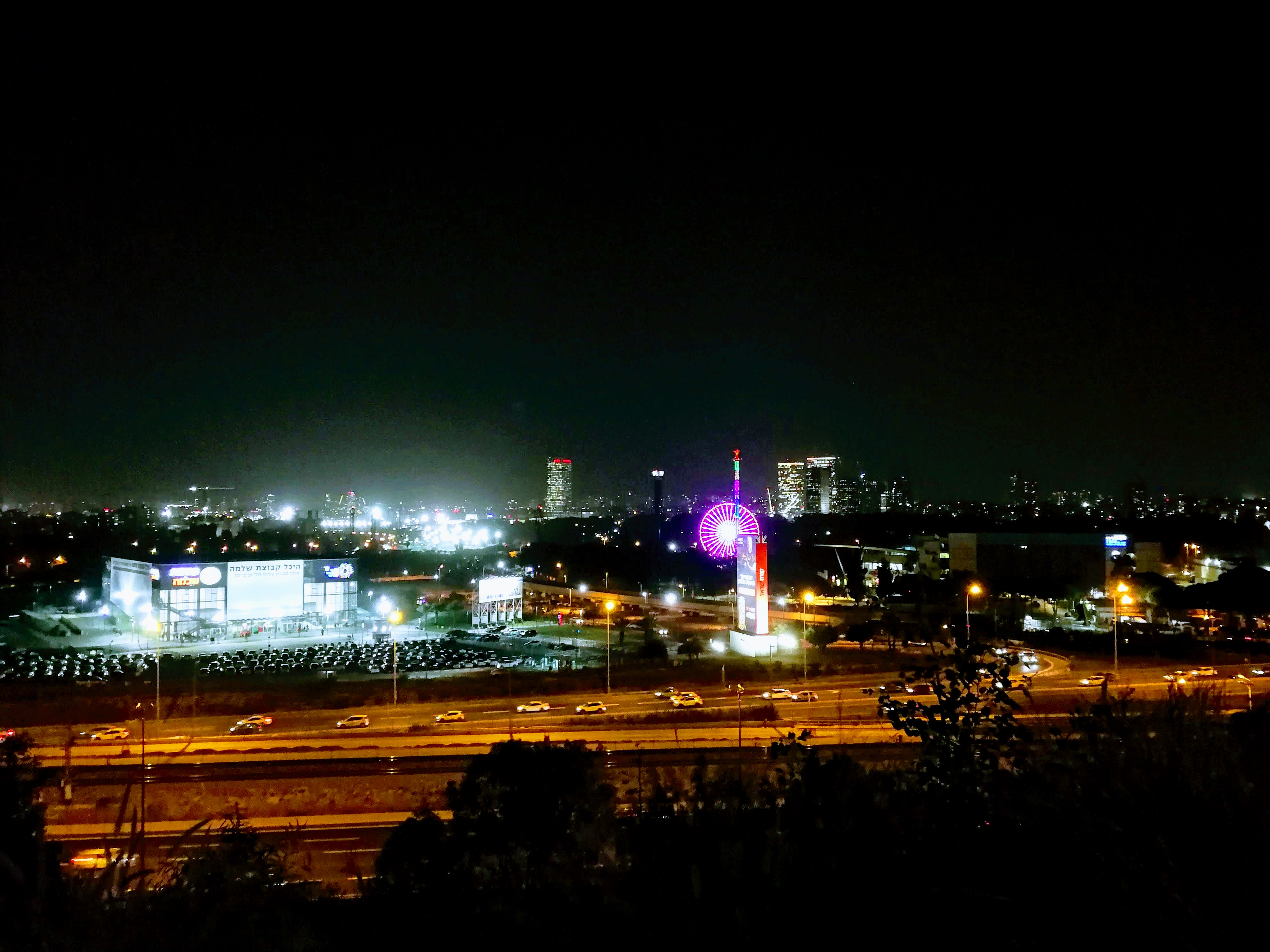 לונה פארק תל אביב בשעת לילה